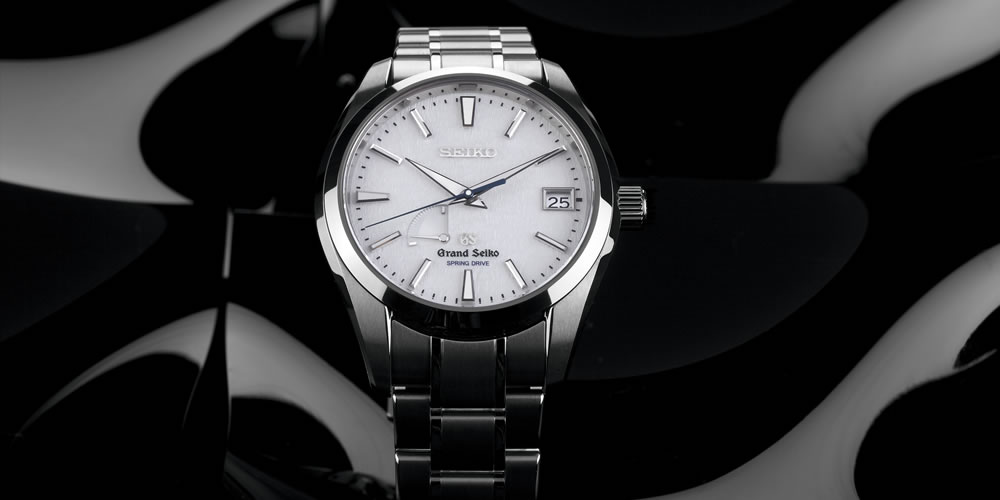 Grand Seiko SBGA011